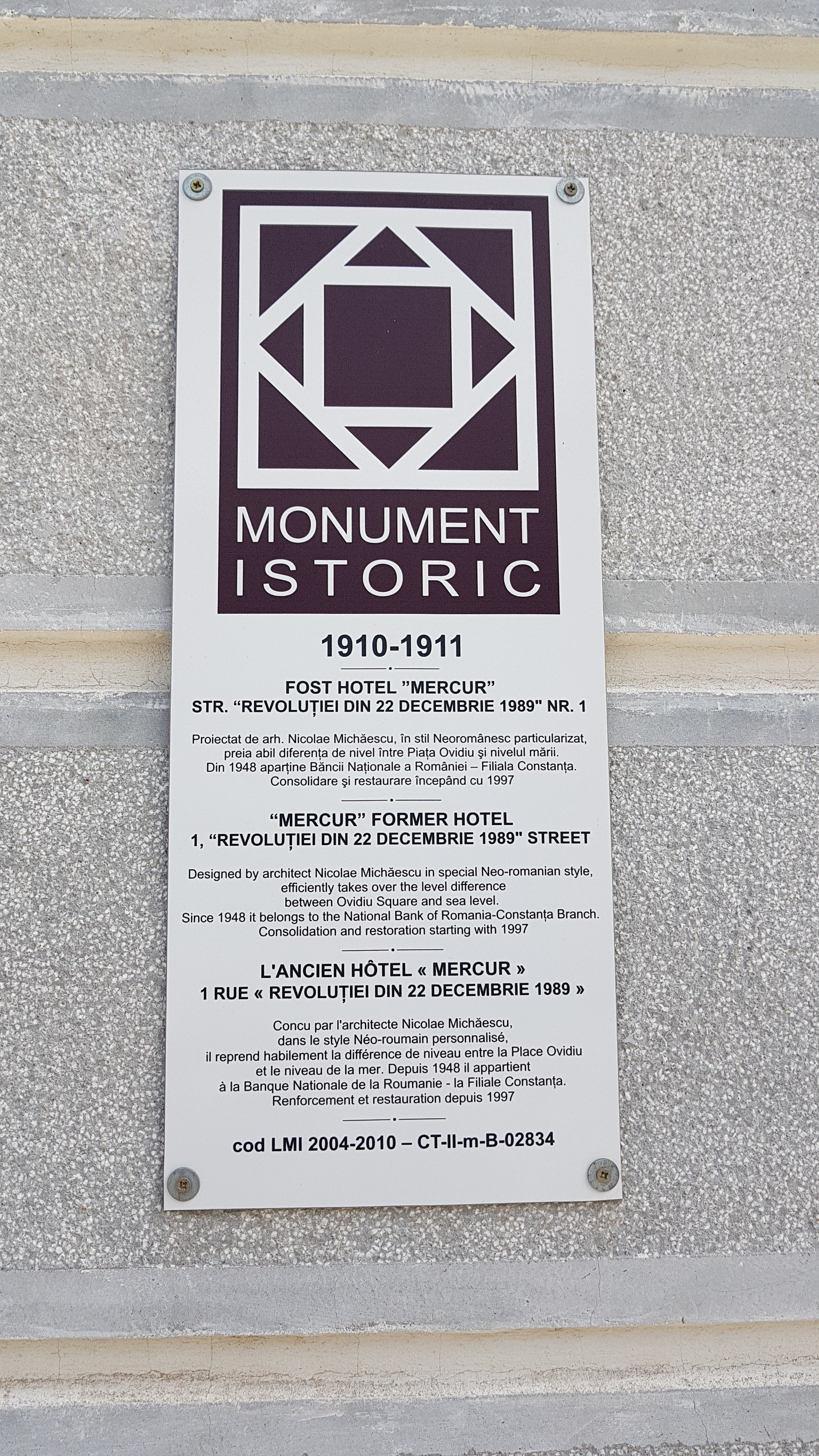 Fost hotel, azi Banca Națională Filiala Constanța